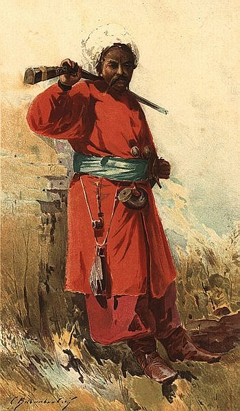 Тип запорожця Акварель. 1900 Type of Zaporozhian Cossack (Ukraine, 17-18c)